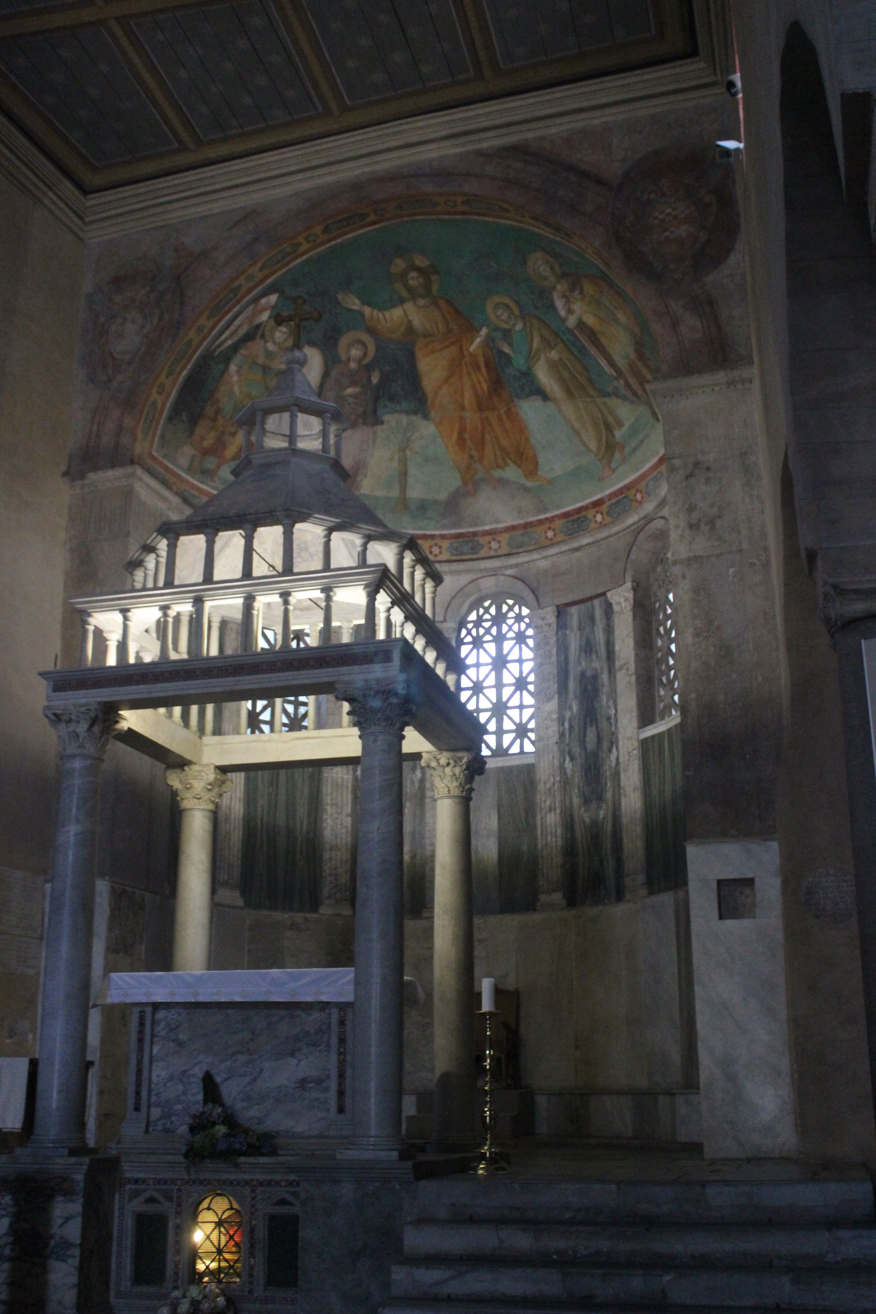 Roma. San Giorgio in Velabro. Interior.